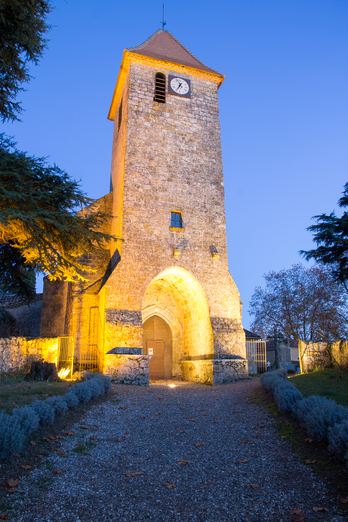 Vue nocturne de l'église Saint Martin du village du Mas d'Auvignon.